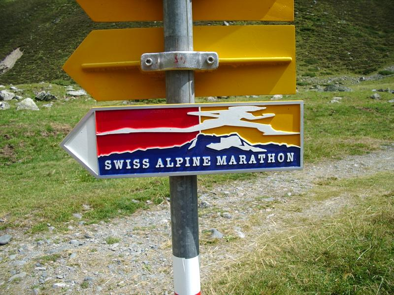 Streckenschild Swiss Alpine Marathon K78